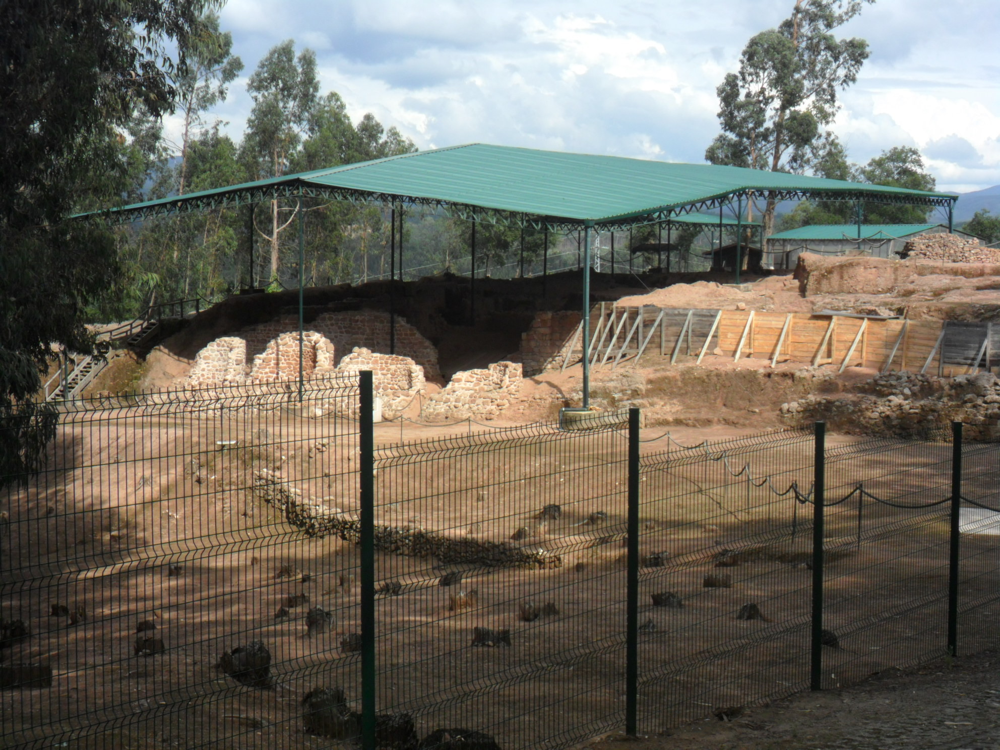 Castelium Marnelis This file was uploaded for Wiki Loves Monuments in Portugal with the unique identifier 69750.